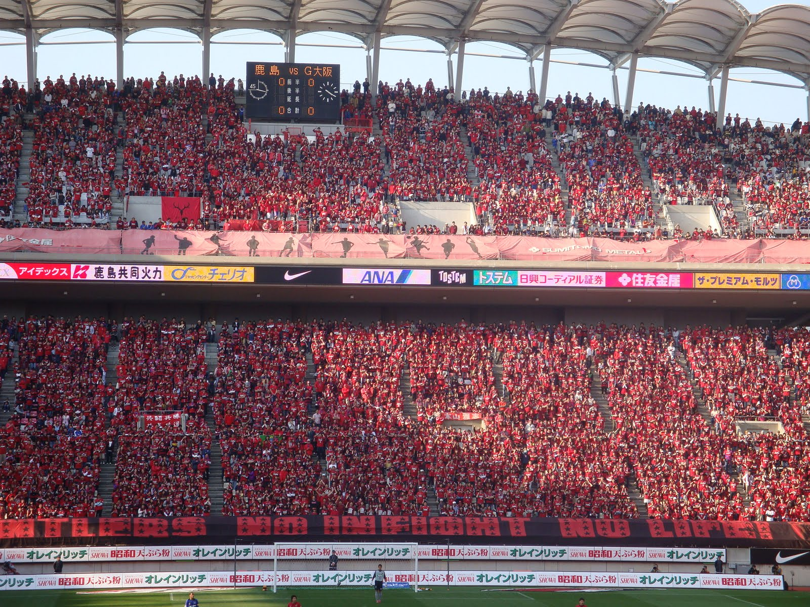 20100501_Kashima Antlers vs Gamba Osaka @Kashima soccer Stadium_004